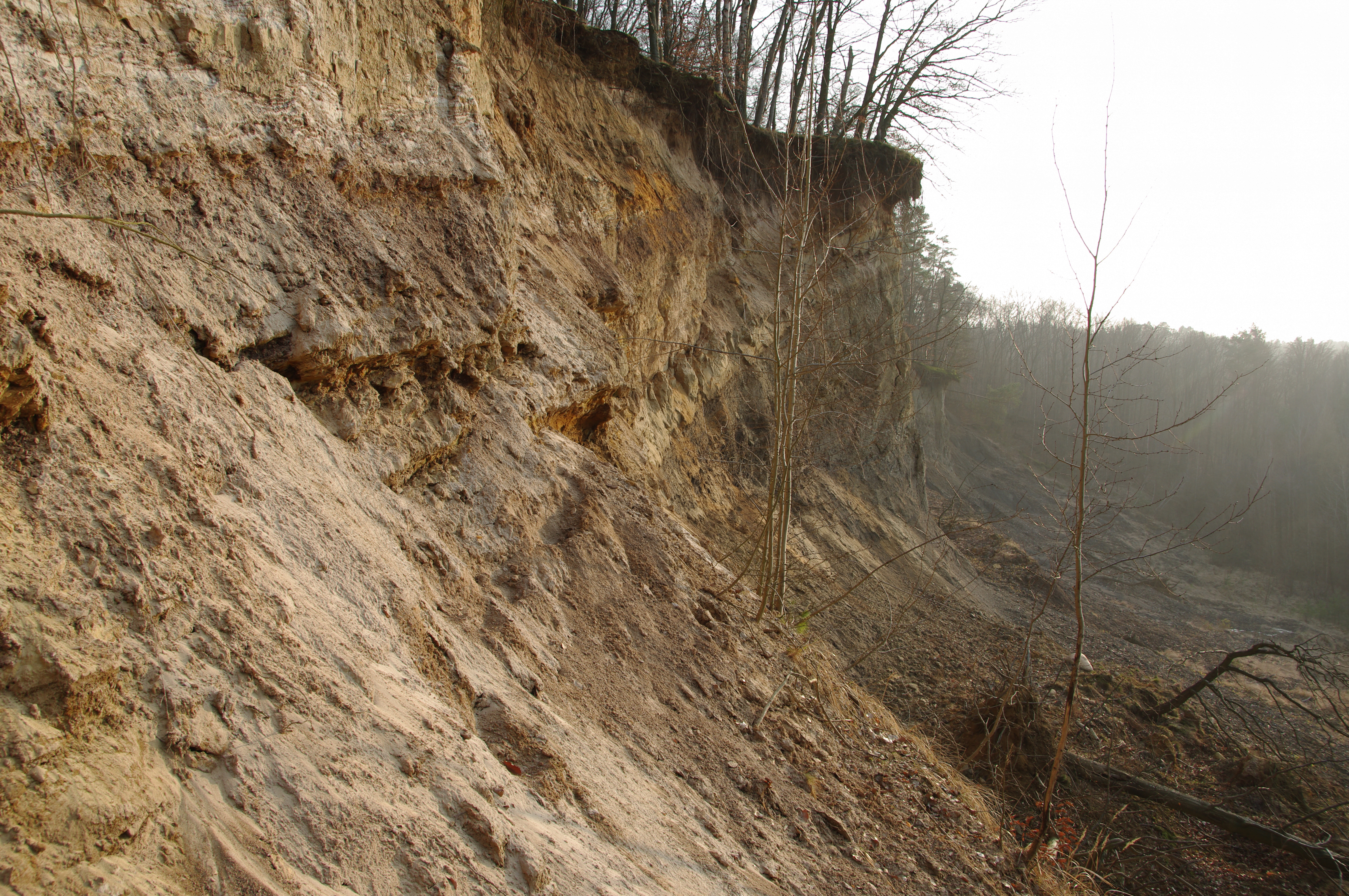 Im Stauchendmoränenkomplex bei Bad Freienwalde (Ostbrandenburg, Lkr. Märkisch-Oderland) wurden tertiäre Sedimente oberflächennah aufgeschoben und durch Bergbau (Tonabbau) aufgeschlossen. In der inzwischen aufgegebenen Grube lassen sich seltene Mineralien und Fossilien finden. Sie liegt innerhalb des LSG "Bad Freienwalde (Waldkomplex)".